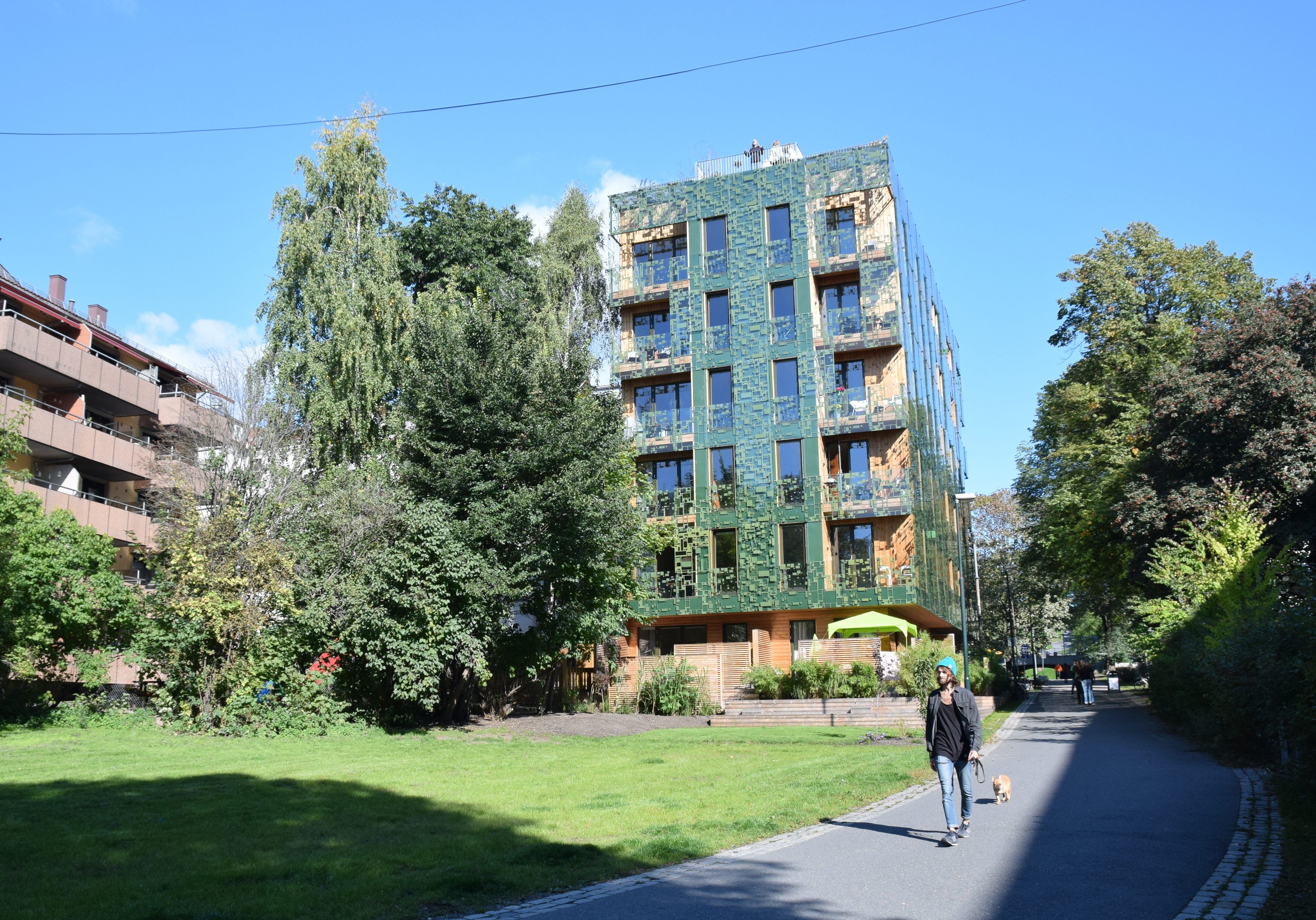 Dælenenggata 36, kalt D36 The Green House, 21 boliger og takhage bygget 2013, sett fra sykkelveien syd for bygningen. Arkitekt: Element arkitekter AS, landskapsarkitekt: Gullik Gulliksen AS